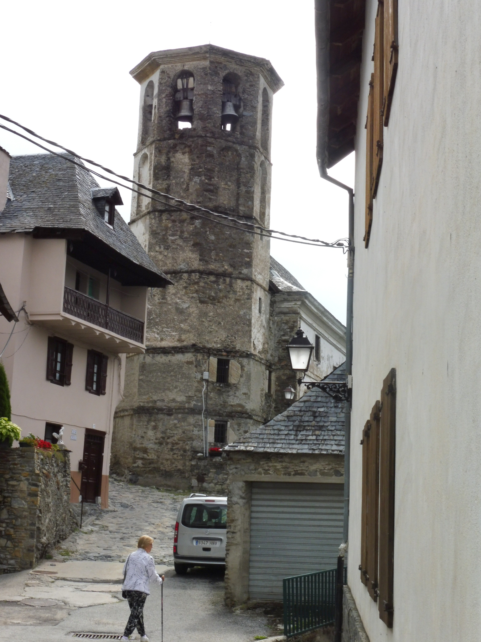 Església de Santa Eulàlia i Sant Joan (Vielha e Mijaran)